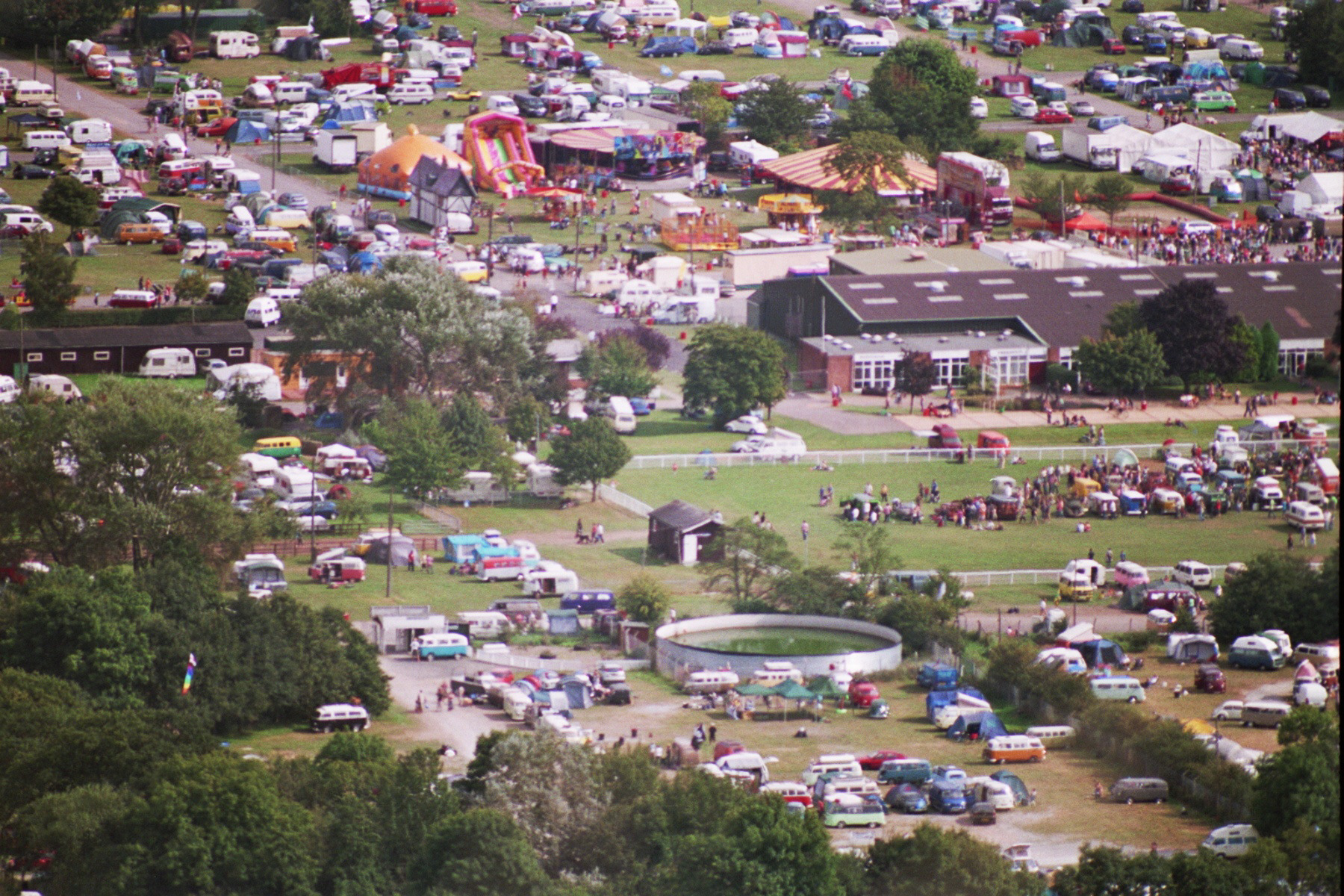 Vanfest 2007